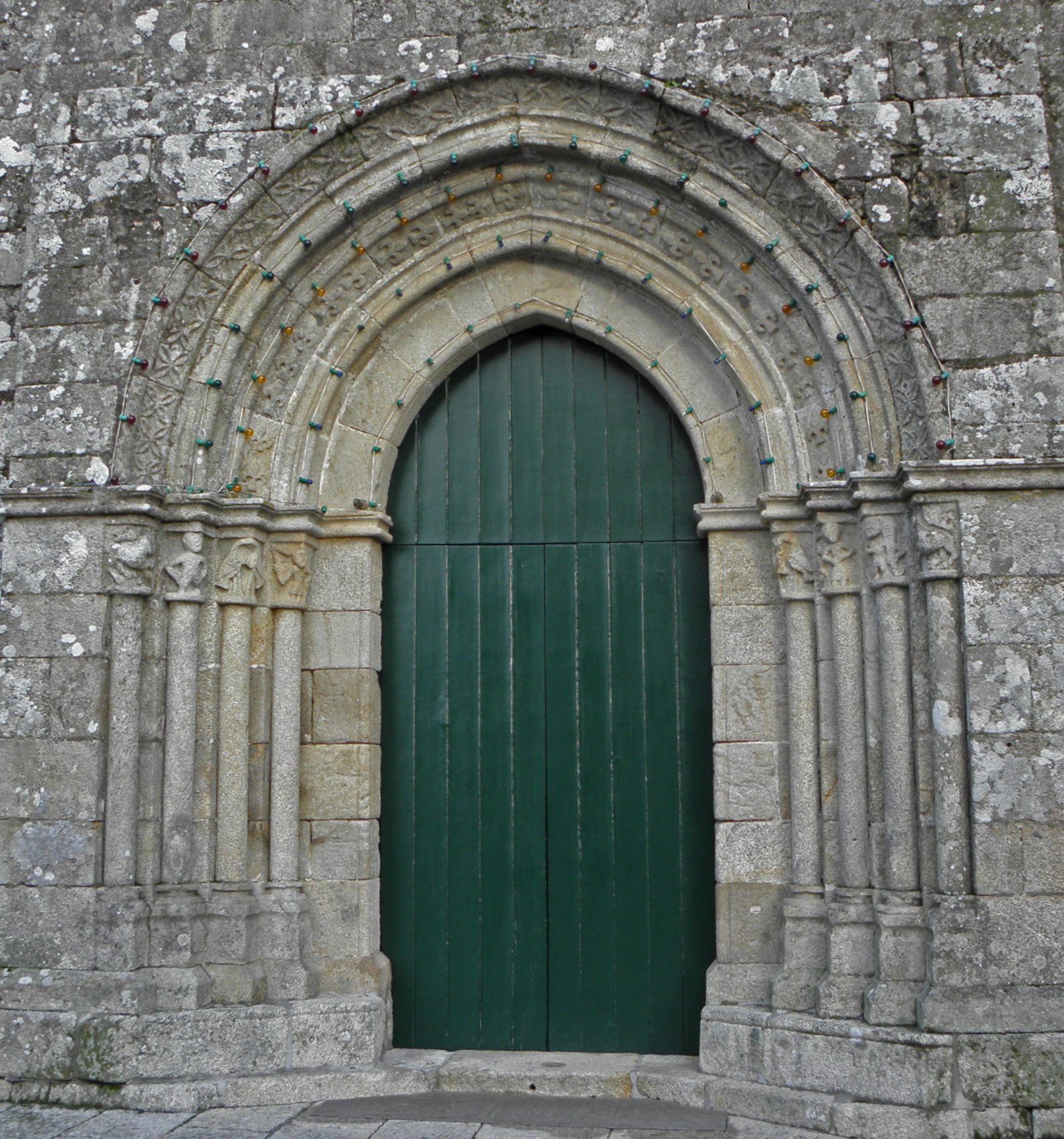 Igreja de Santa Maria de Abade de Neiva, em Barcelos.